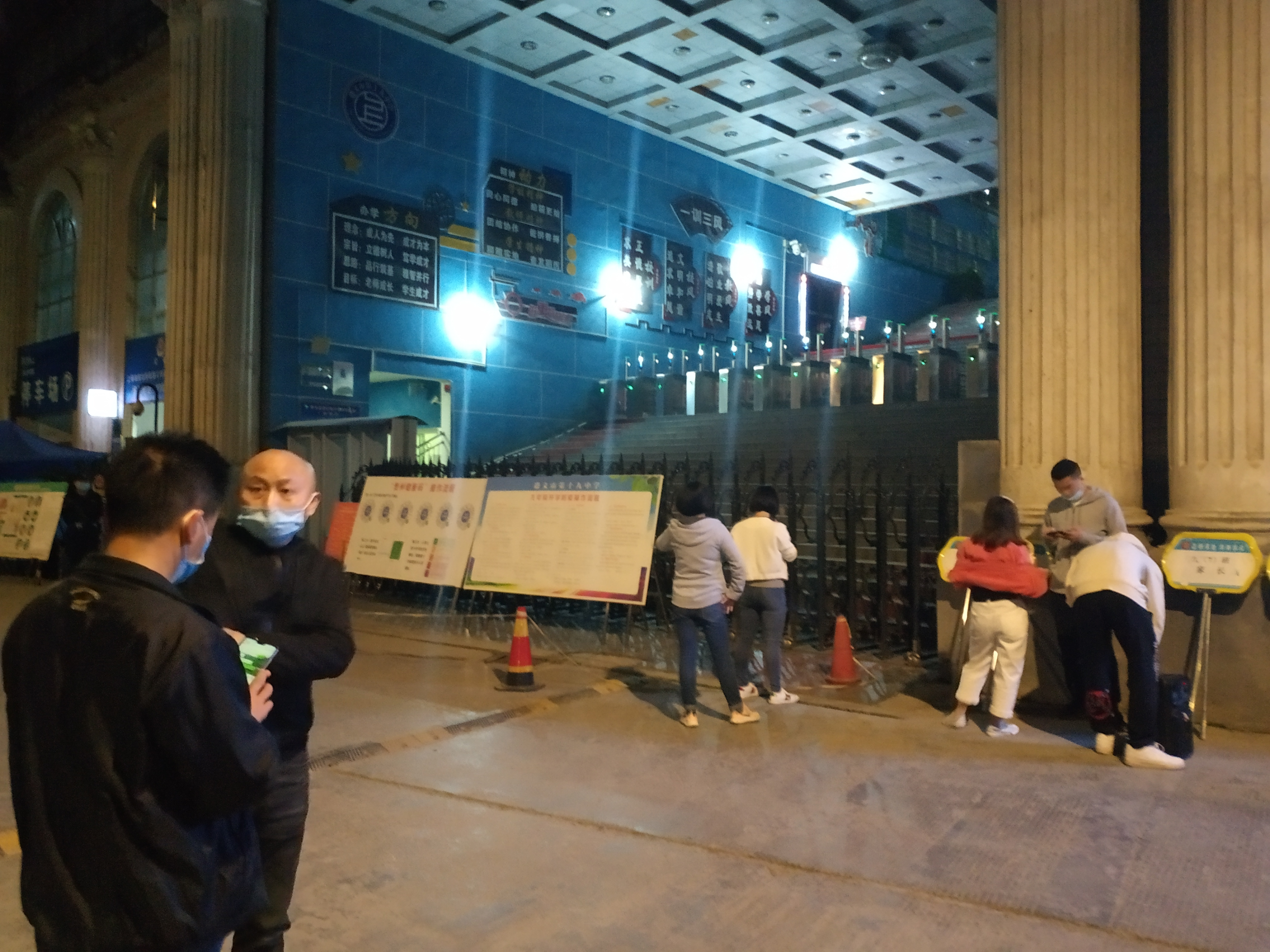 中文（中国大陆）: 中国贵州省，一所在新冠疫情下采取半封闭式管理的已复学学校。